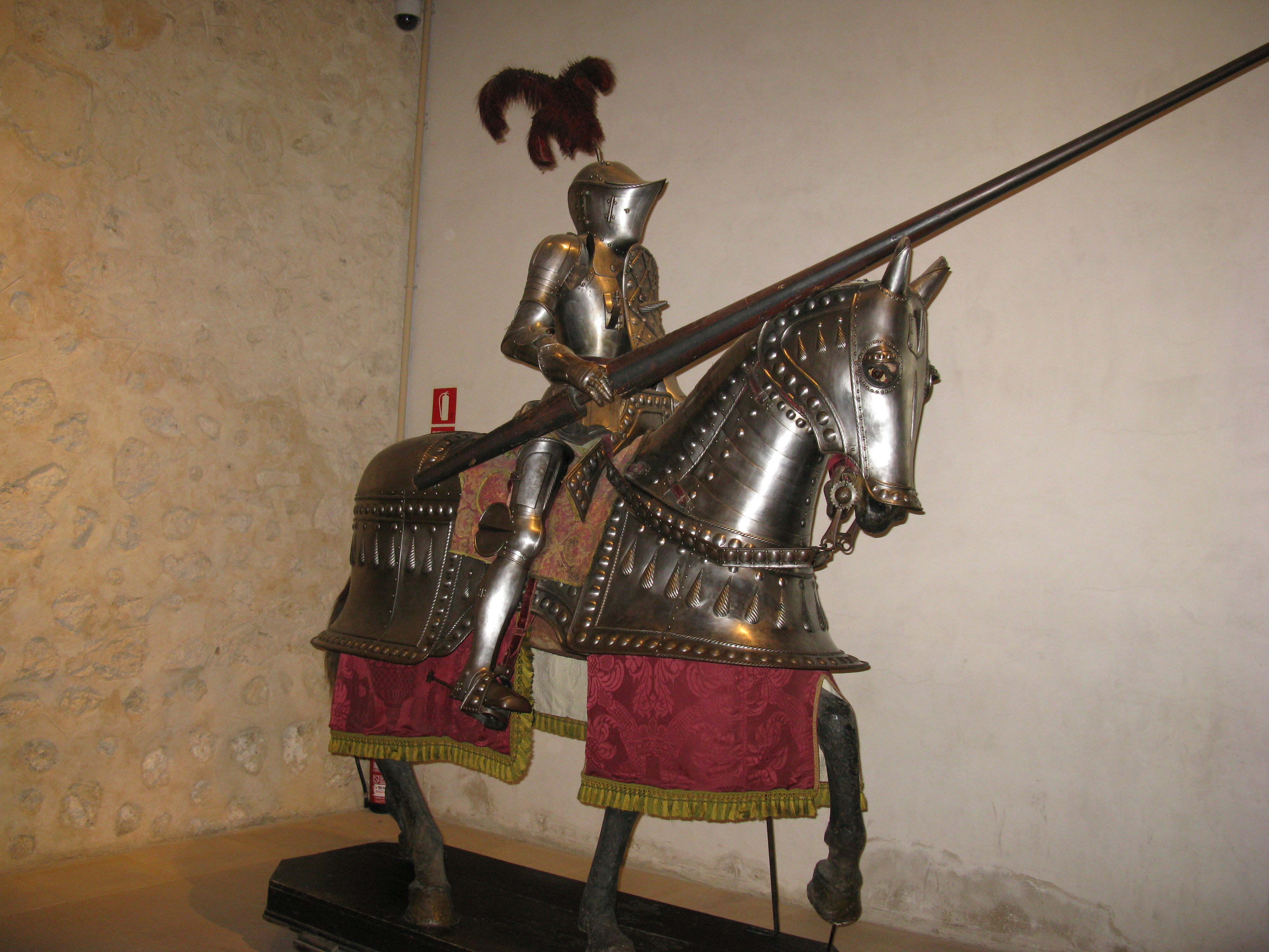 Armadura de caballero en la armería del Alcázar de Segovia (España)